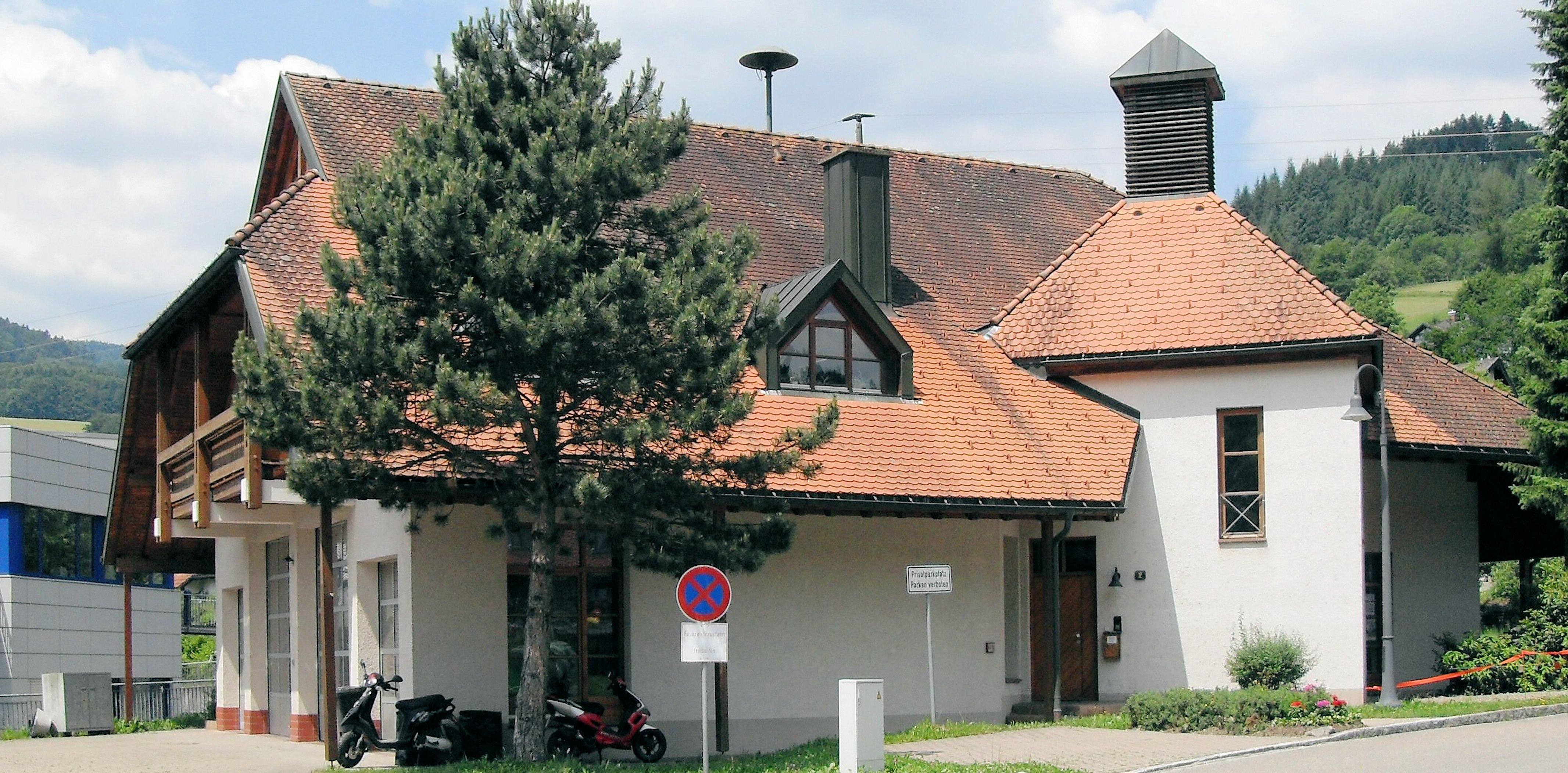 Rathaus in Wembach